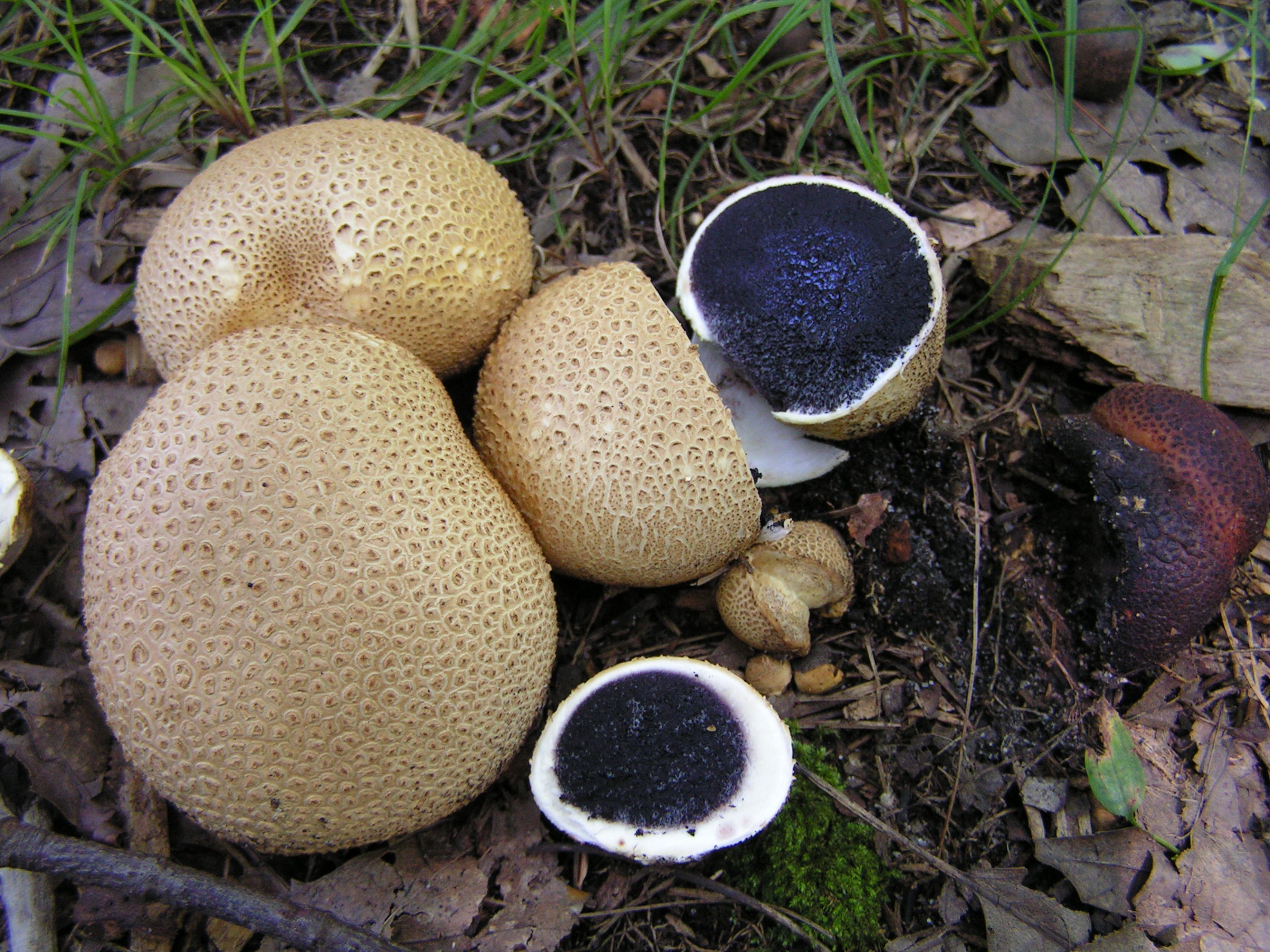 Scleroderma citrinum Pers.